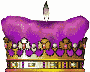 German Erlaucht Crown